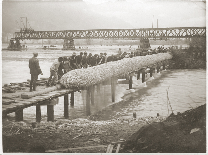 Wiederaufbau des Rheindamms nach dem Dammbruch oberhalb der Eisenbahnbrücke bei Schaan